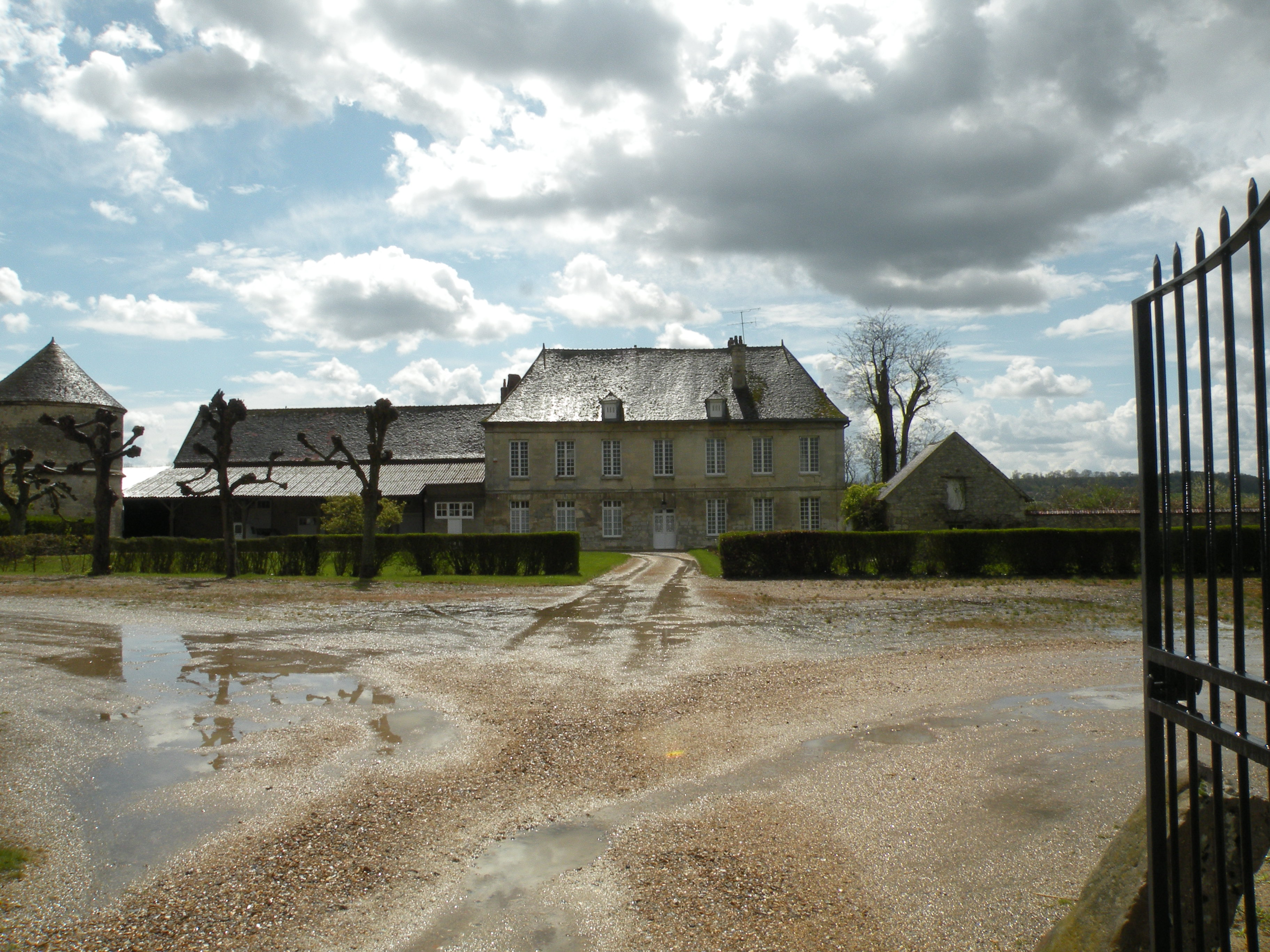 ferme dans le centre vile d'Ivry-le-Temple